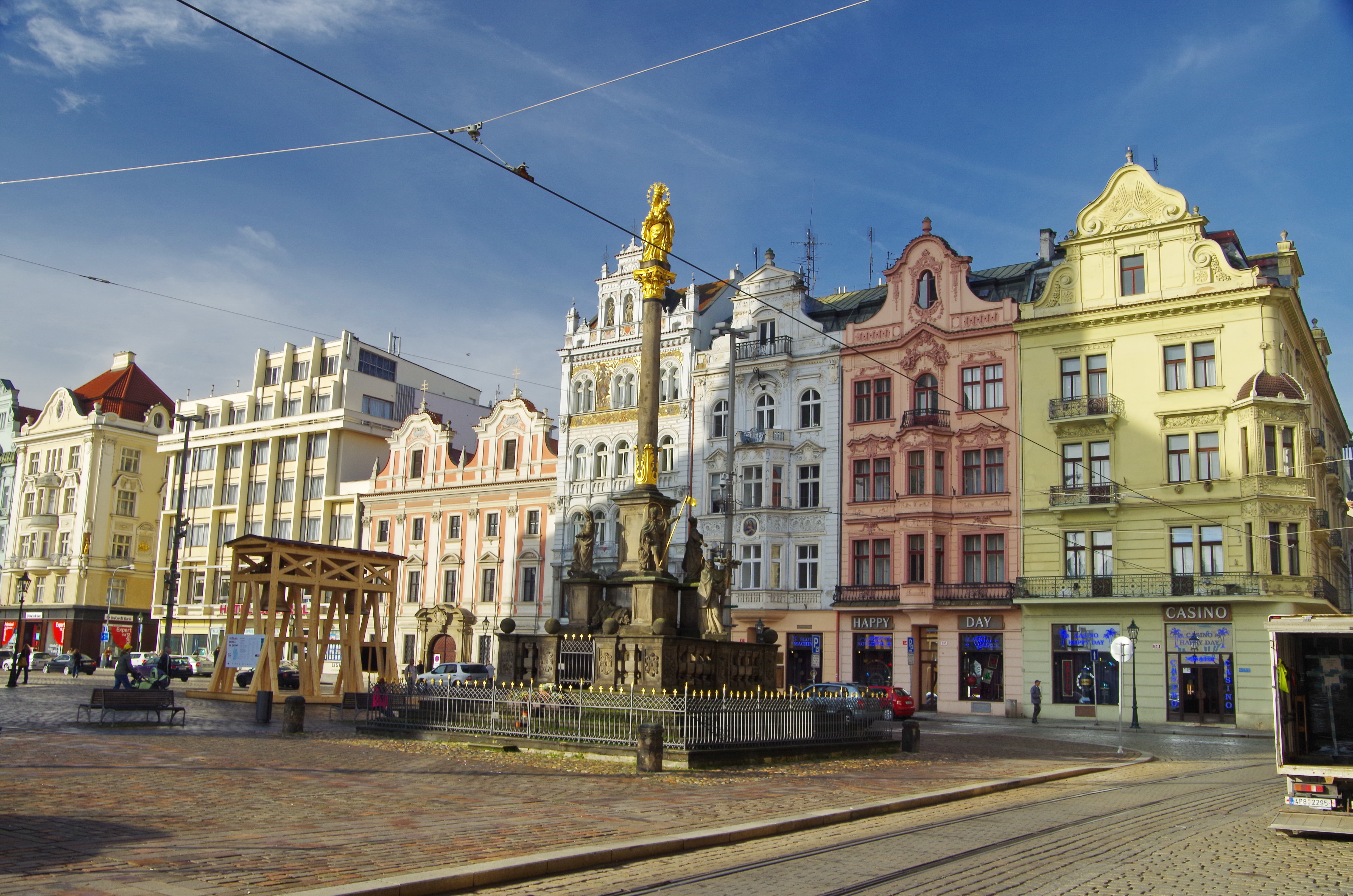 Am Platz der Republik, Vordergrund Pestsäule